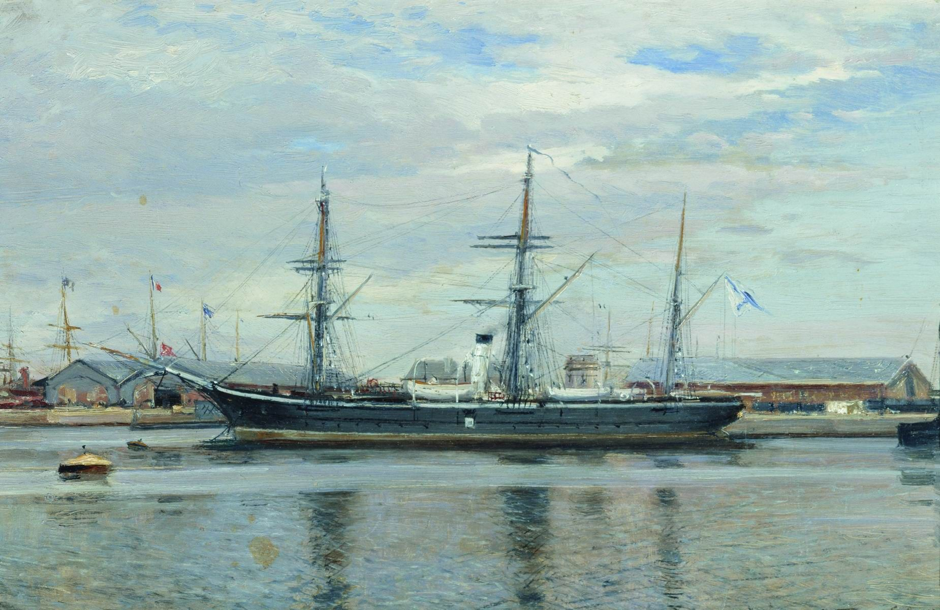 «Клипер "Разбойник" в Гавре.»